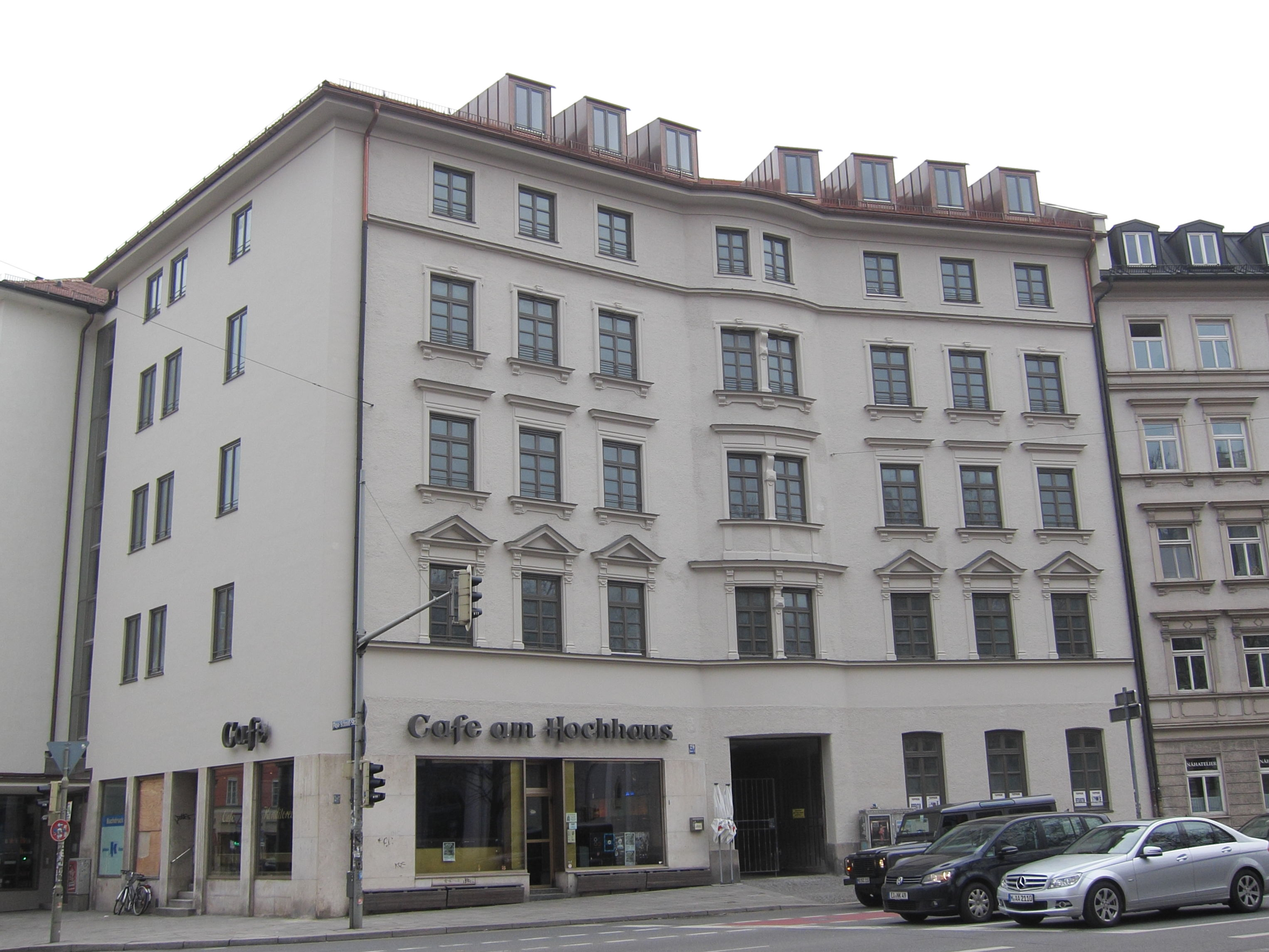 Blumenstraße 29; Ehem. Gaststätte und Mietshaus in Ecklage, sog. Blumensäle, fünfgeschossiger Neurenaissancebau, 1889 von Ludwig Deiglmayr.